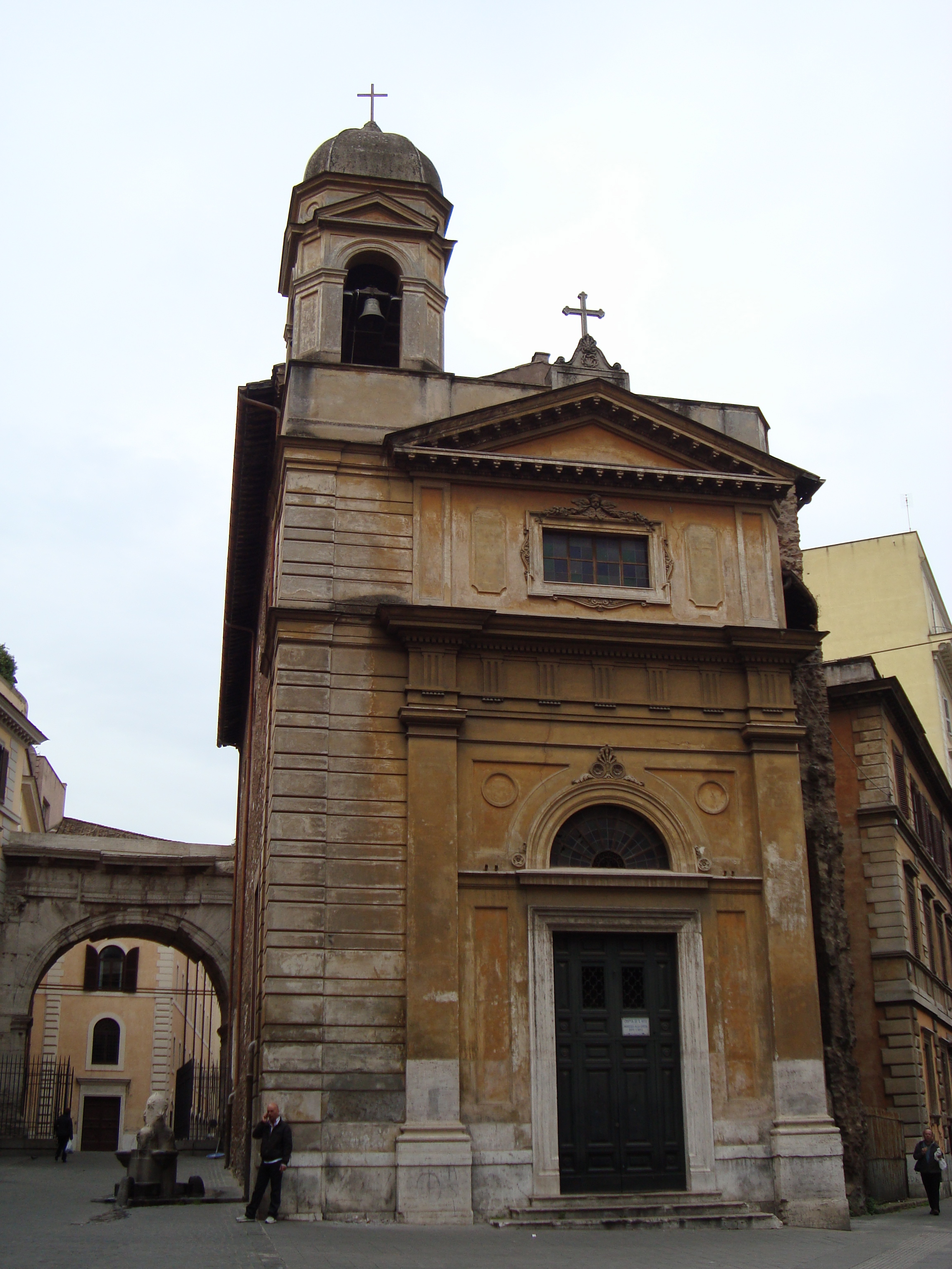 Facade avant de l'église Santi Vito e Modesto de Rome